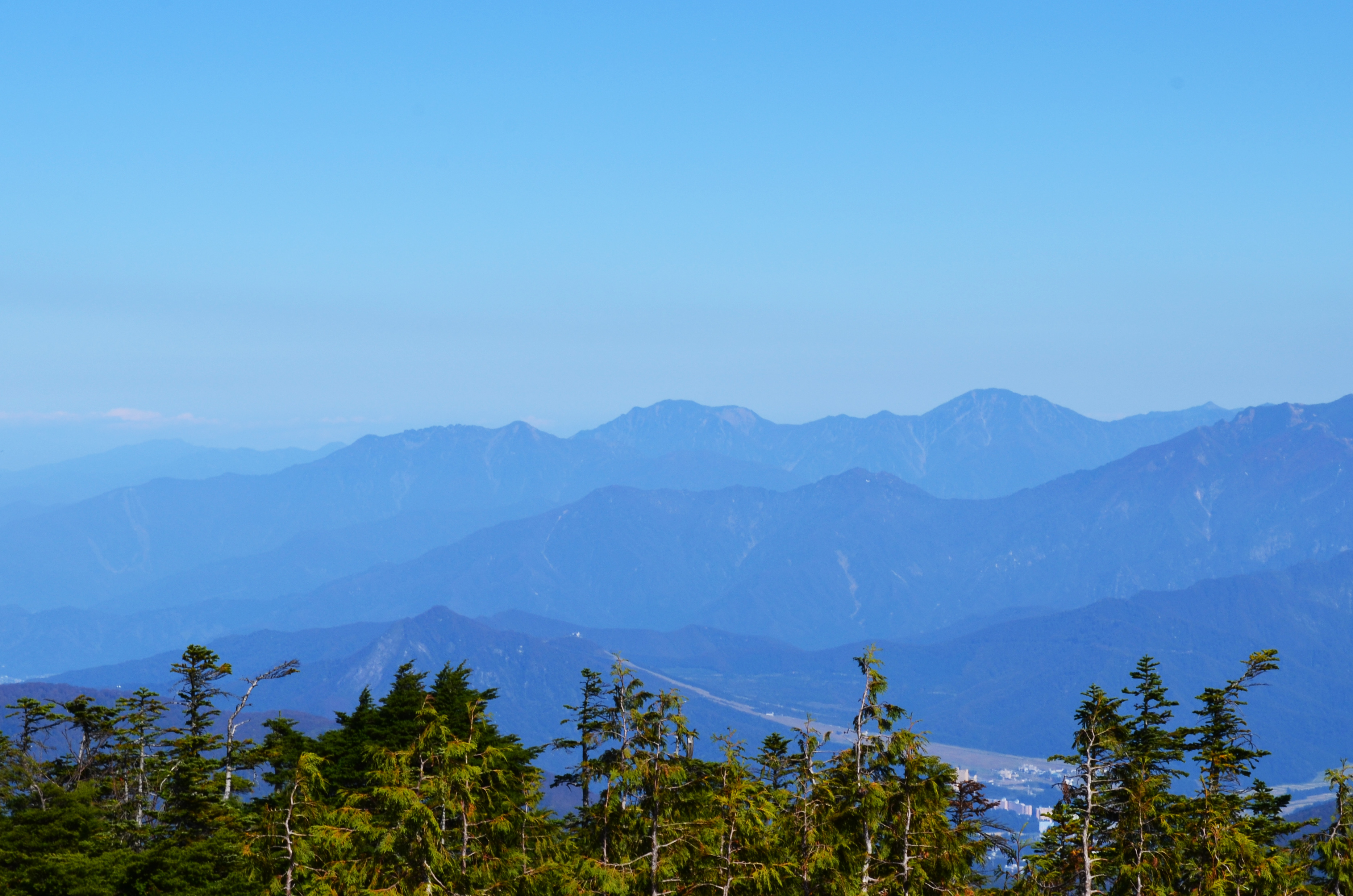 苗場山中腹(上ノ芝)より望む魚沼三山。左から八海山、魚沼駒ヶ岳、中ノ岳。